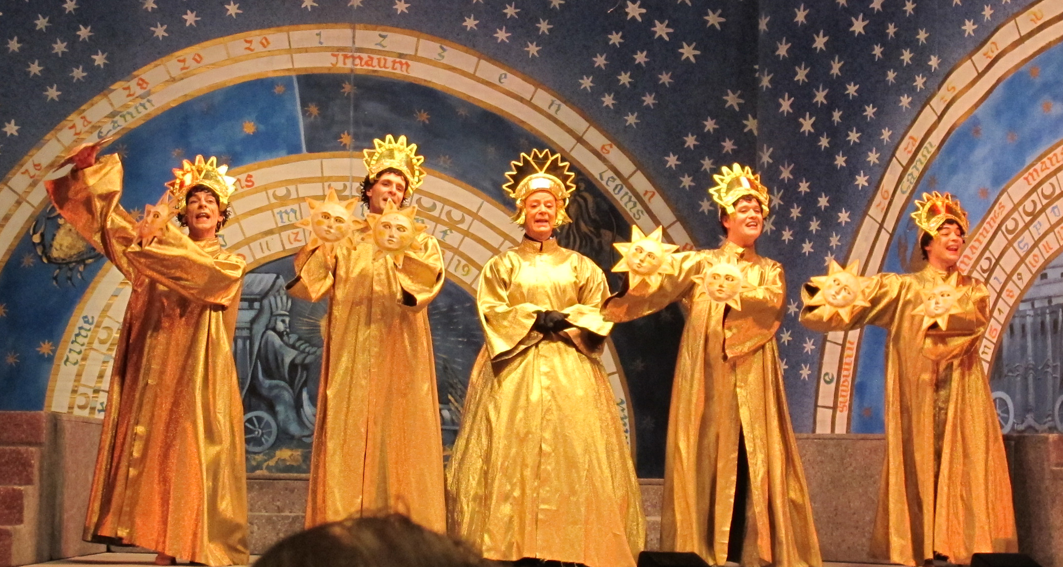 Firenze